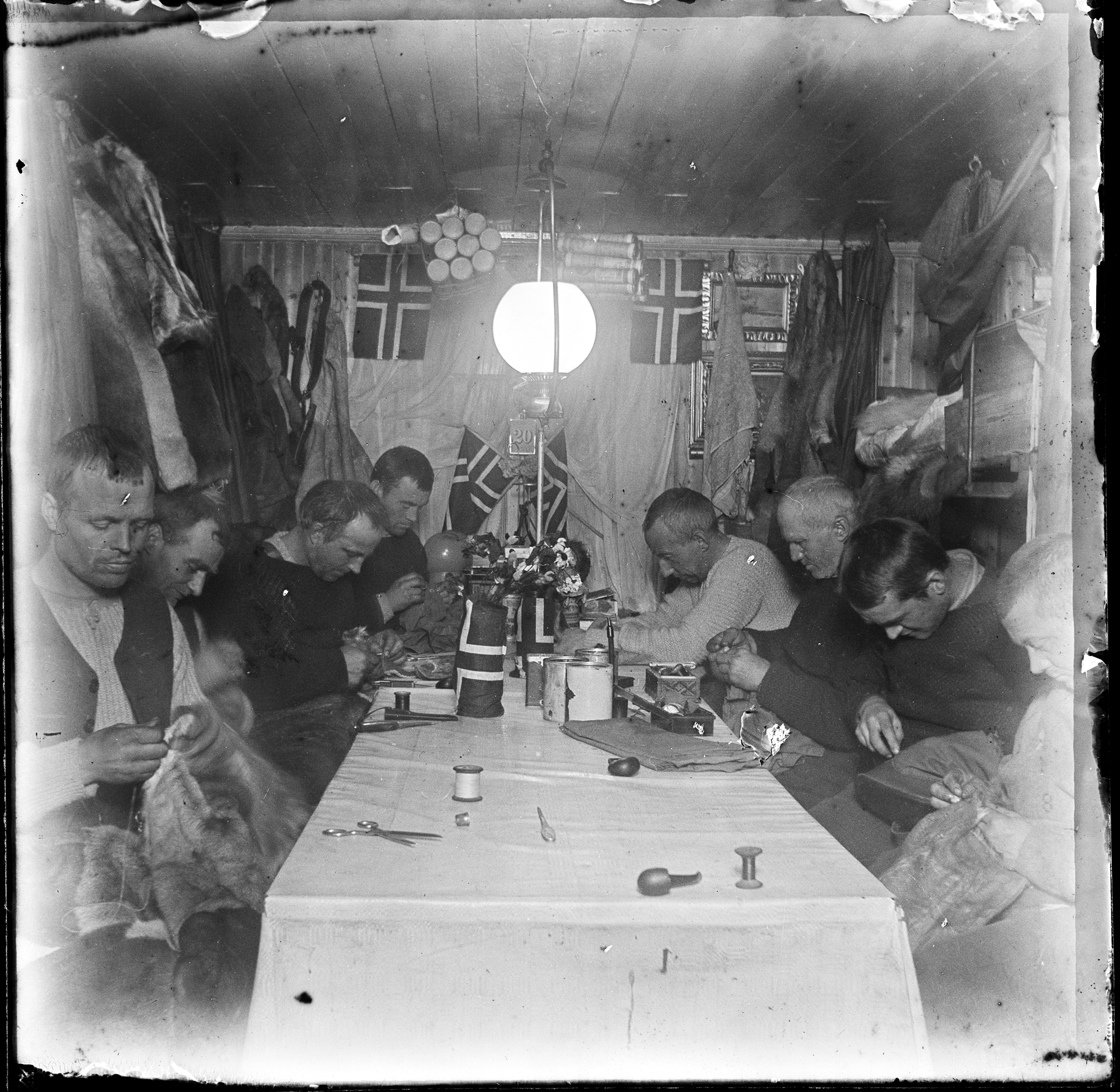 Tittel / Title: I Framheims stue sys det på diverse utstyr Motiv / Motif: Negativ glassplate. Rundt bordet sitter Olav Bjaaland, Sverre Hassel, Oscar Wisting, Helmer Hanssen, Roald Amundsen, Hjalmar Johansen, Kristian Prestrud, og Jørgen Stubberud. Alle mann måtte gjøre en del slikt arbeid. Bl.a. ble skinndraktene som var laget etter eskimoisk mønster sydd om etter mål, nesebeskyttere til solbrillene ble laget, trekkseler til hundene ble modifisert. Dato / Date: 1911 Fotograf / Photographer: ukjent / unknown Sted / Place: Antarktis, Hvalbukta, Framheim Eier / Owner Institution: Nasjonalbiblioteket / National Library of Norway Lenke / Link: Bildesignatur / Image Number: bldsa_NPRA1482